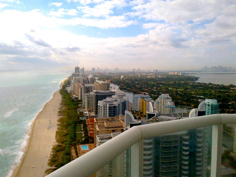 Vista dall' Akoya Miami Beach